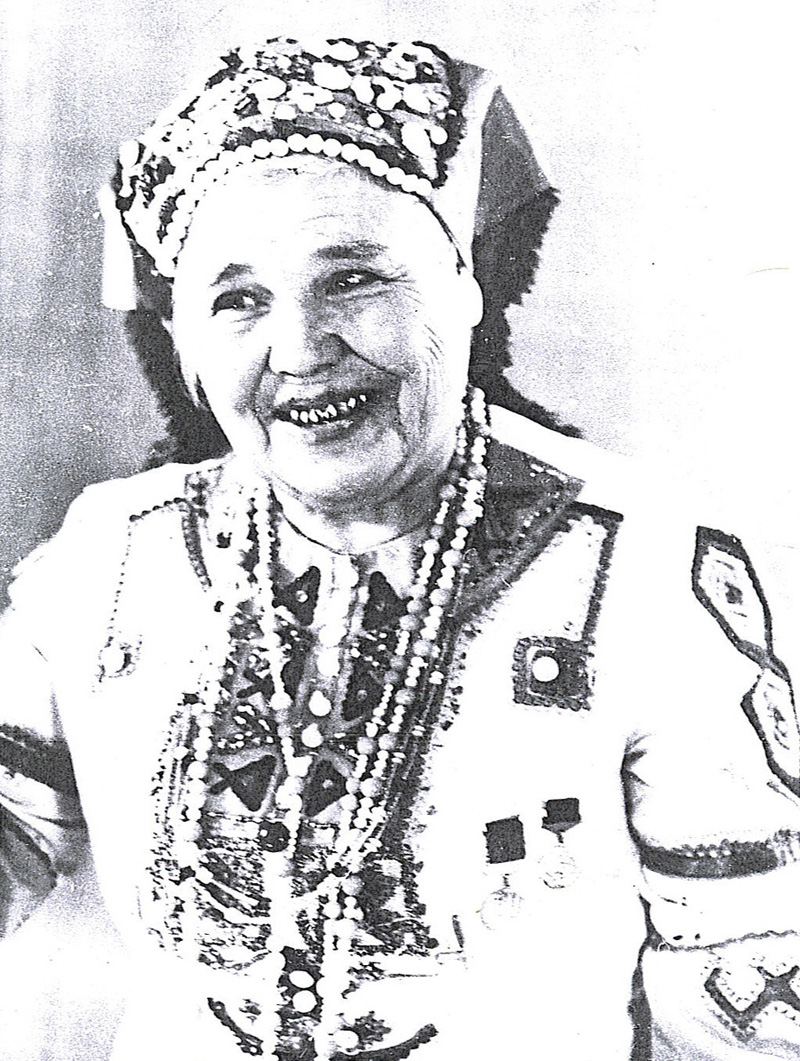 Серафима Марковна Люлякина